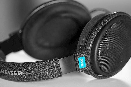 halboffener Kopfhörer, HD600